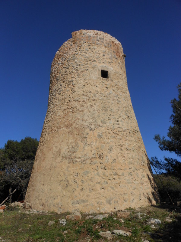 La torre nel Maggio 2013 alla fine dei lavori di consolidamento e di ripristino